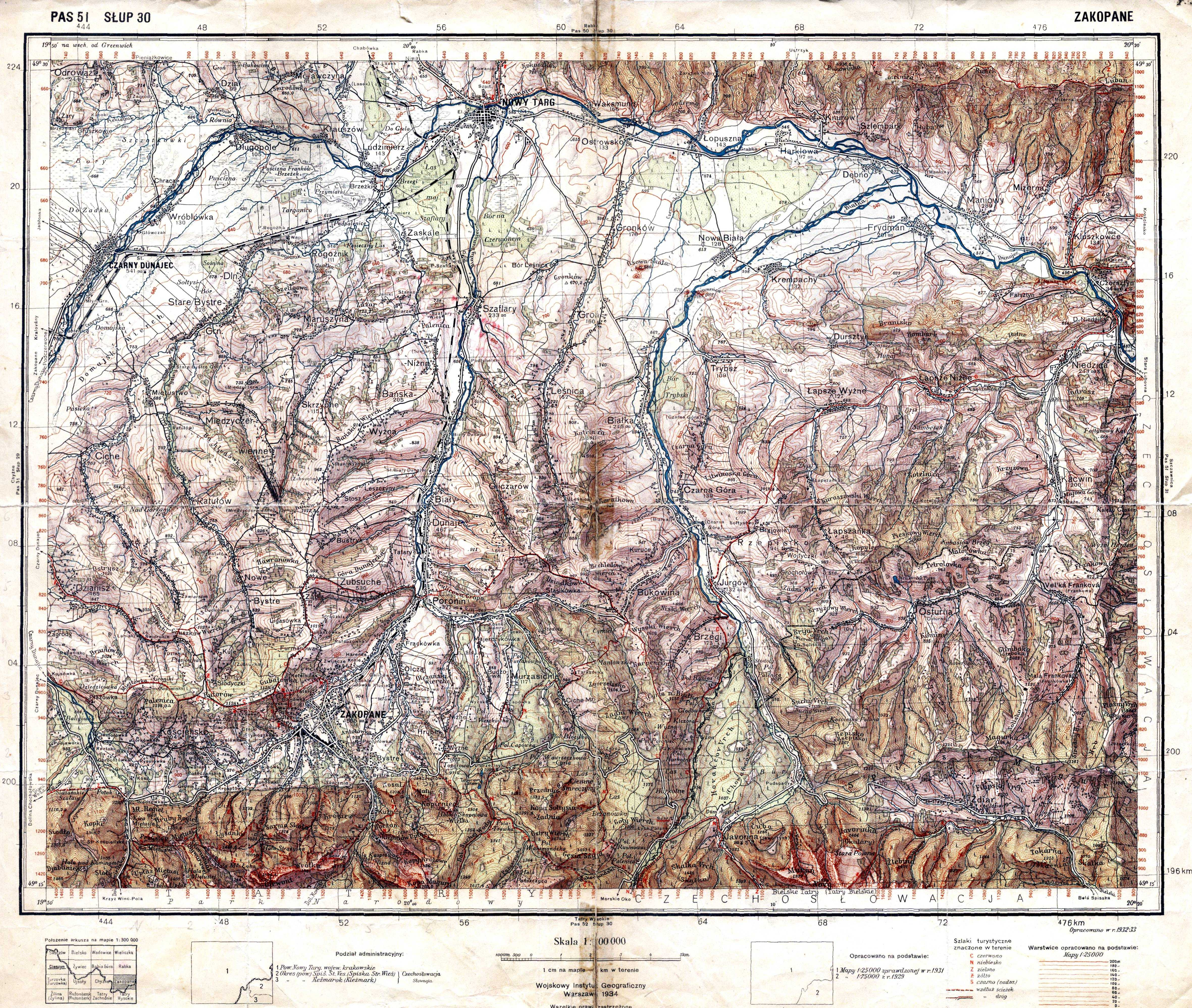 Mapa topograficzna 1:100.000 arkusz Zakopane (pas 51, słup 30)